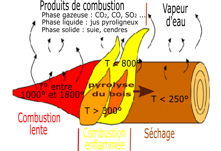 Schéma de combustion du bois. Trois phases : séchage, combustion enflammée, combustion lente.